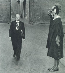 l'archiatra pontificio Riccardo Galeazzi Lisi